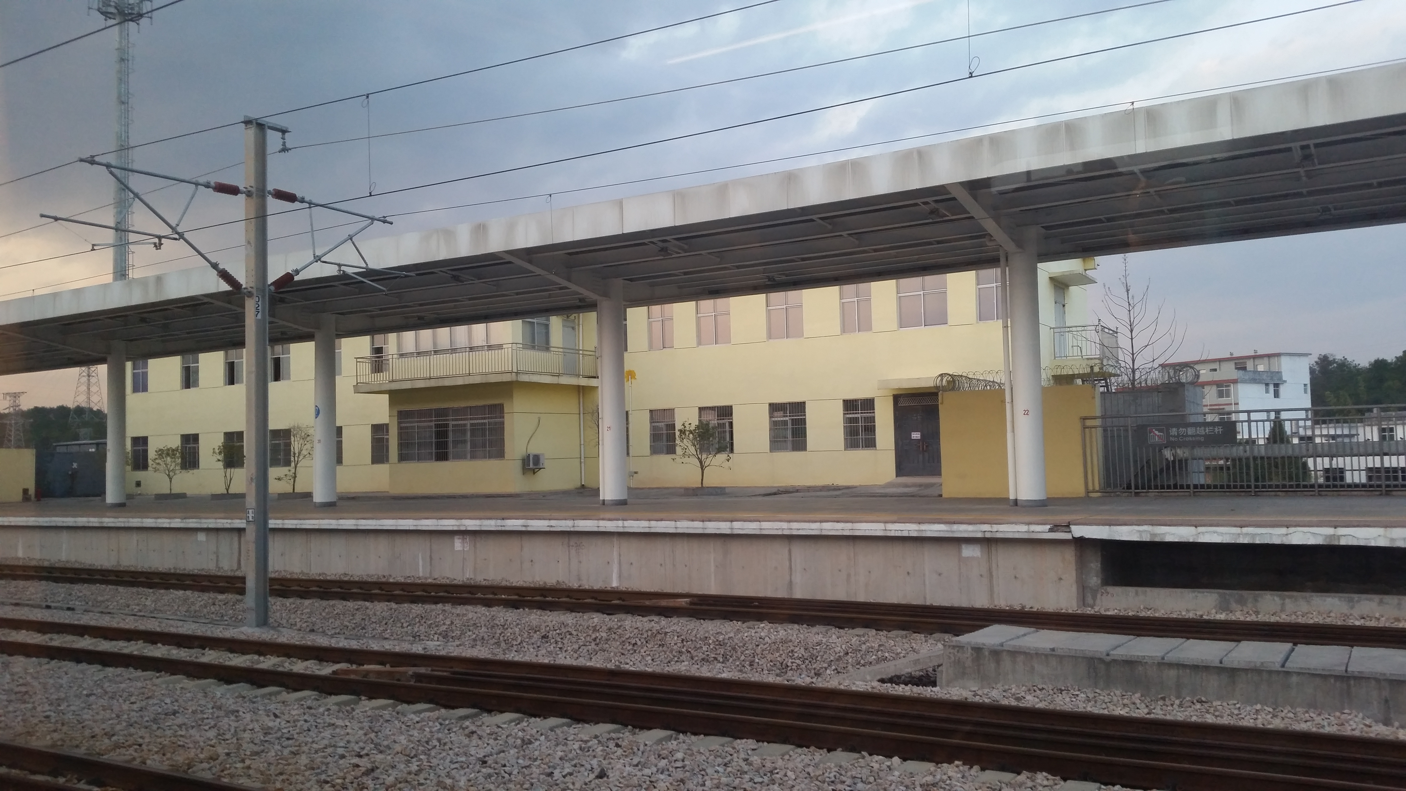 于都站5站台和站内正线